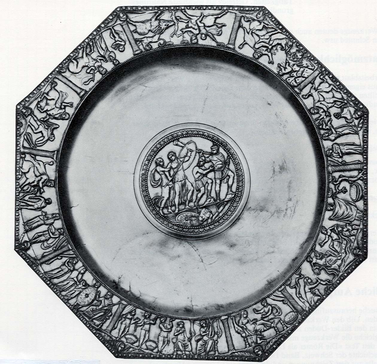 die Achillesplatte aus dem Silberschatz von Kaiseraugst